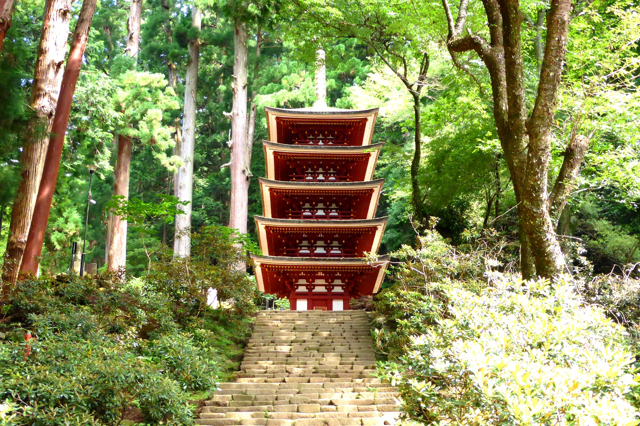 Muro-ji, Goju-no-to (Five-storied Pagoda) -1 (July 2013)